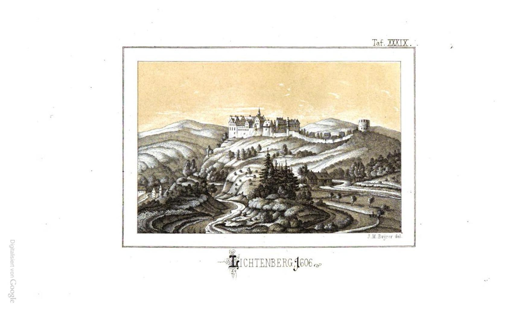 Lichtenberg um 1606